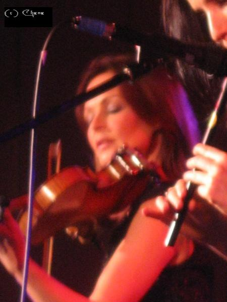 Sharon Corr.